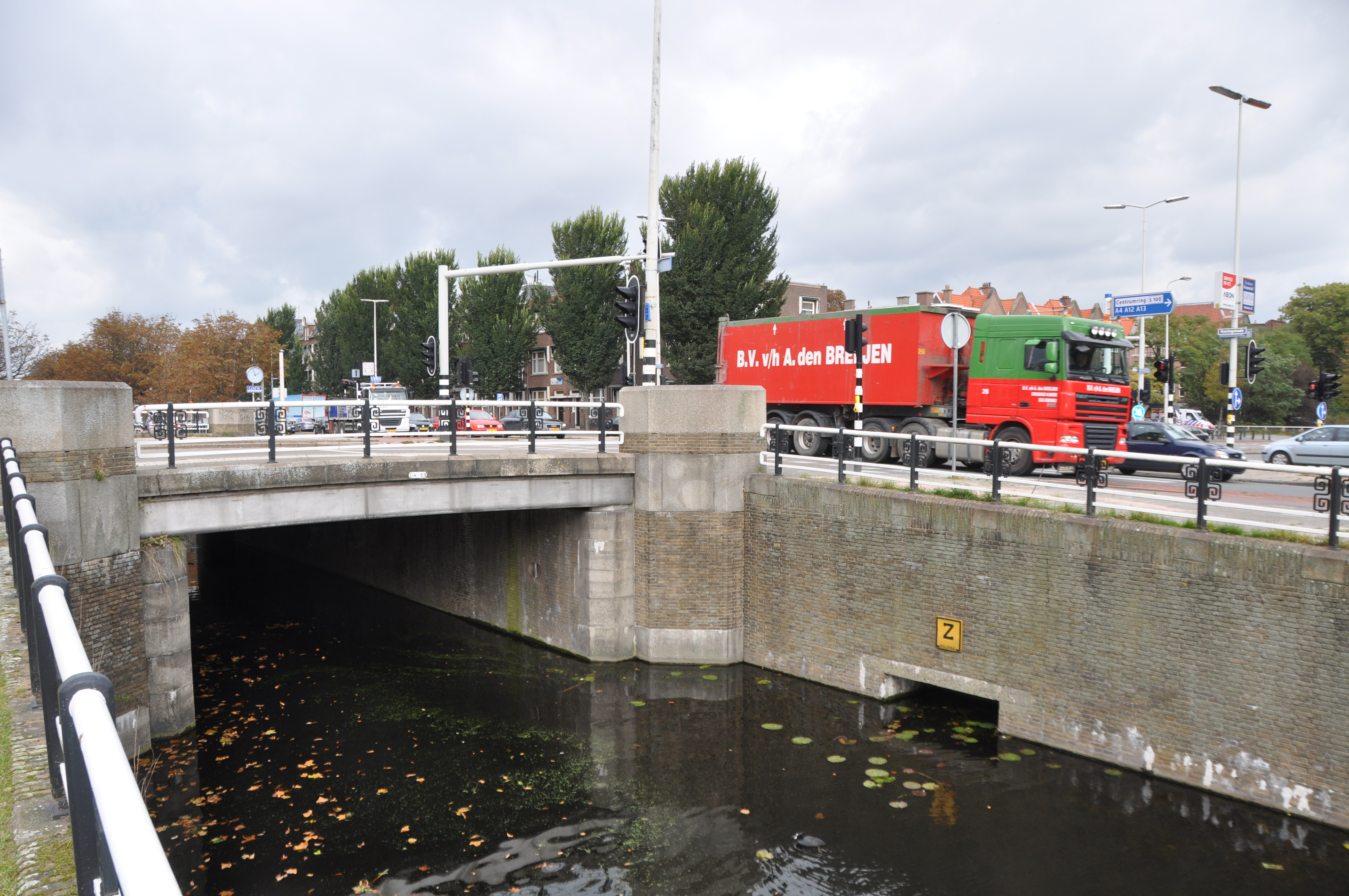 Bruggen in Den Haag.